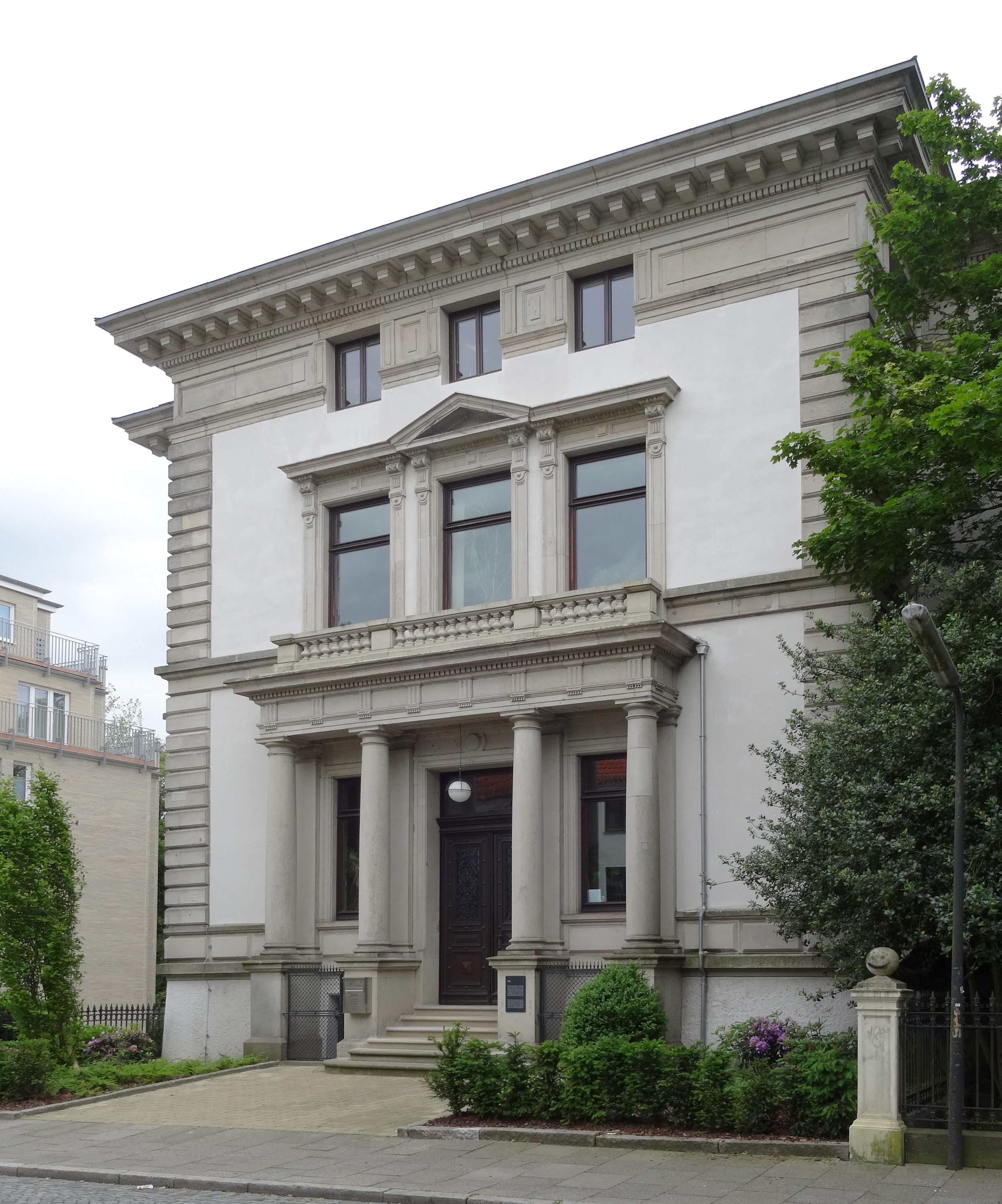 Villa Wolde in Bremen, Osterdeich 64. Eingang Lübecker StraßeDas abgebildete Objekt ist ein geschütztes Kulturdenkmal in der Freien Hansestadt Bremen, mit der Nr. 0967 beim Landesamt für Denkmalpflege registriert.